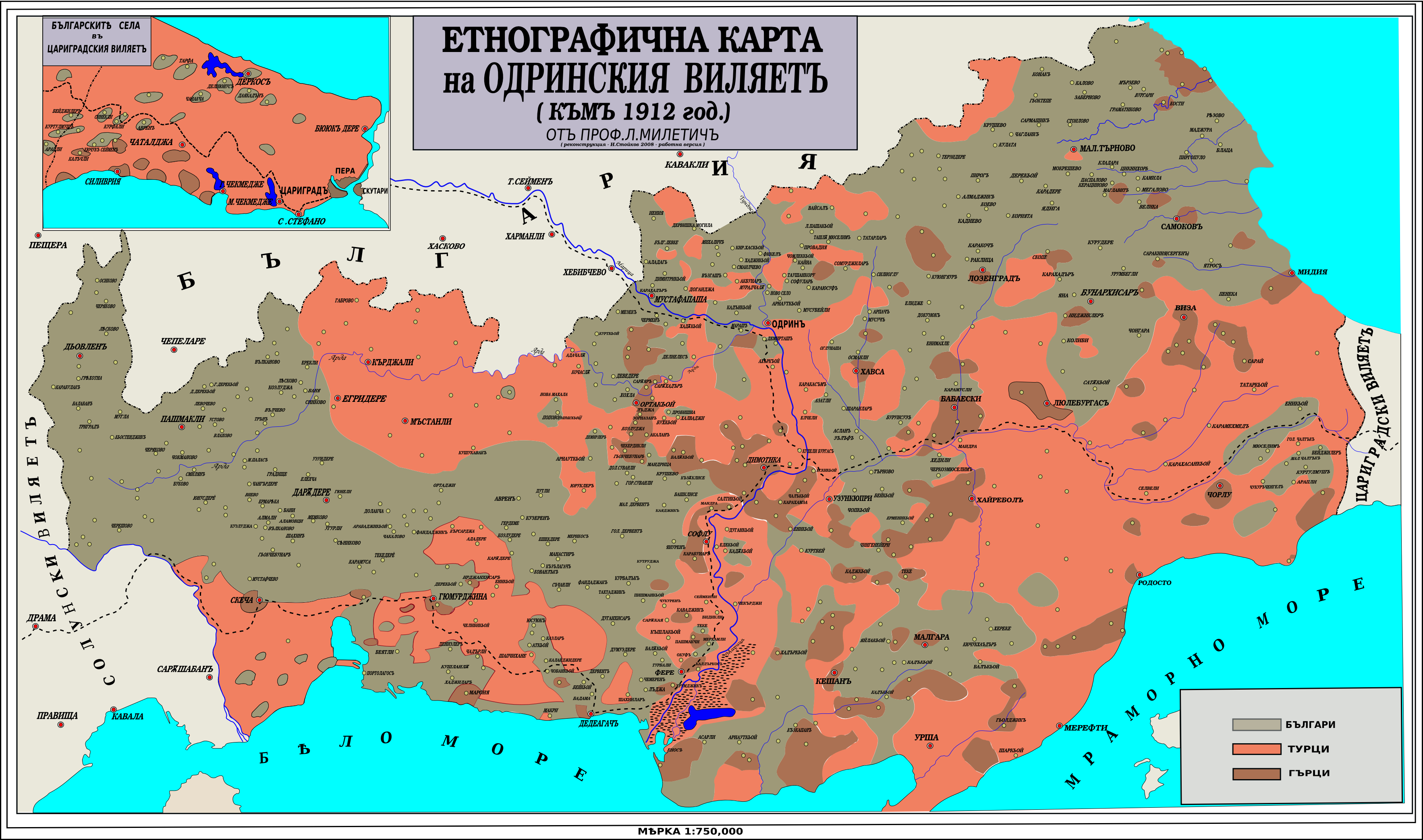 Ретуширана версия на Image:Ethnographic-map-Thrace-1912.jpg - недовършена